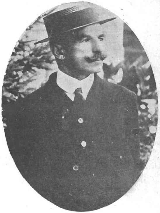 Pedro Hernán Trizano Avezzana (Valparaíso, 1860 - Temuco, 17 de diciembre de 1926) fue un militar chileno, organizador del Cuerpo de Gendarmes de las Colonias, entidad cuya misión era vigilar la seguridad en las provincias de Arauco, Malleco, Cautín, Valdivia y Llanquihue y el cuidado de las reservas forestales para impedir que éstas fueran destruidas por labradores clandestinos.